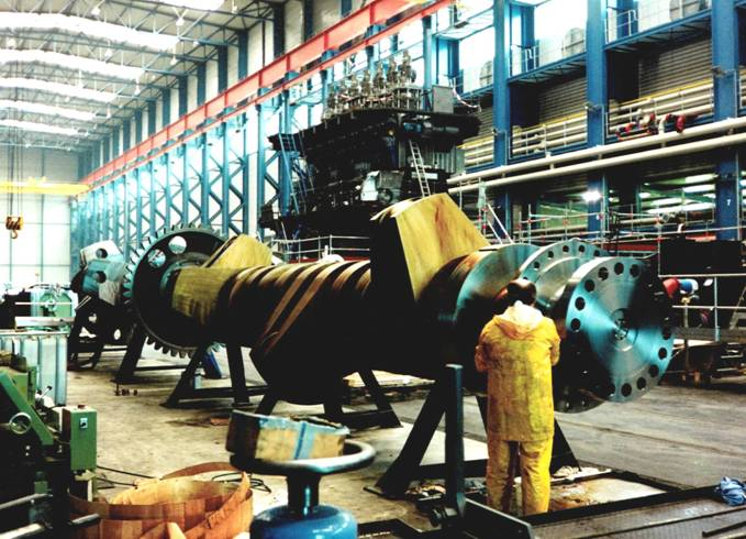 Kurbelwelle eines Schiffsdieselmotors